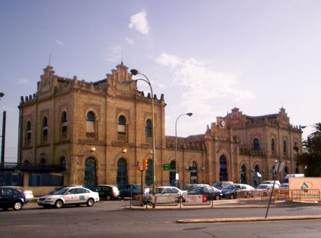 Estación de Tren en Huelva, España, de finales del XIX y estilo neomudejar.